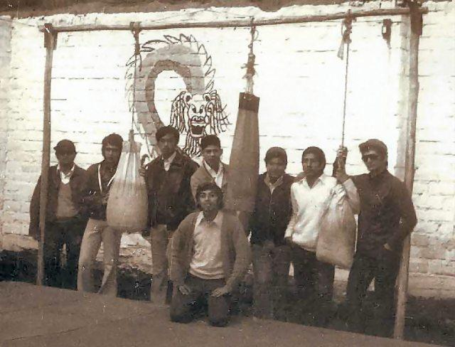 Chung Shang Huy Kun, klubben där Choy Gar har sitt ursprung i Lima,Peru.Sifu Adolfo Tijero ses längst till höger.